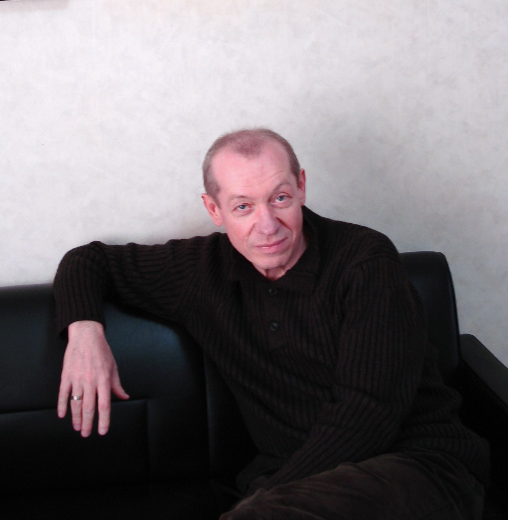 (C)M,Kazakevich, 2009